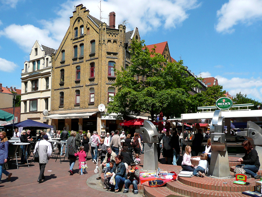 Lister Meilen Fest 2009